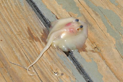 Atlantic stingray (Dasyatis sabina) fetus